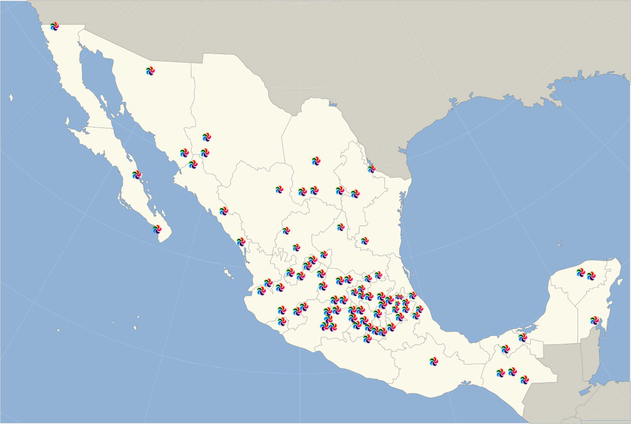 Mapa que muestra la distribución de los 83 Pueblos Mágicos de México existentes desde 2012.